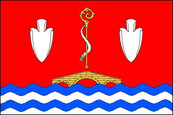 Vlajka obce Sobčice